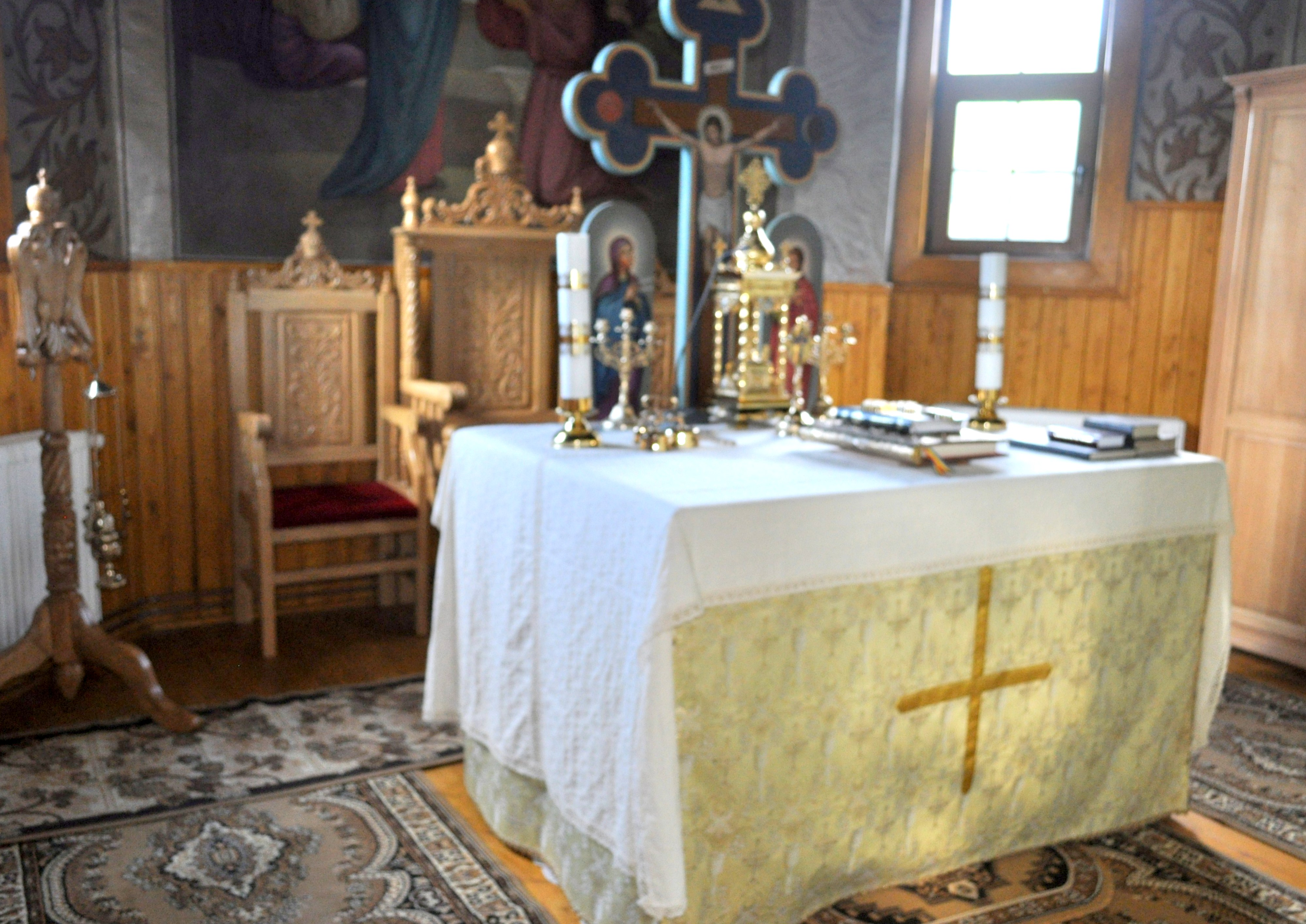 Răchițele, județul Cluj